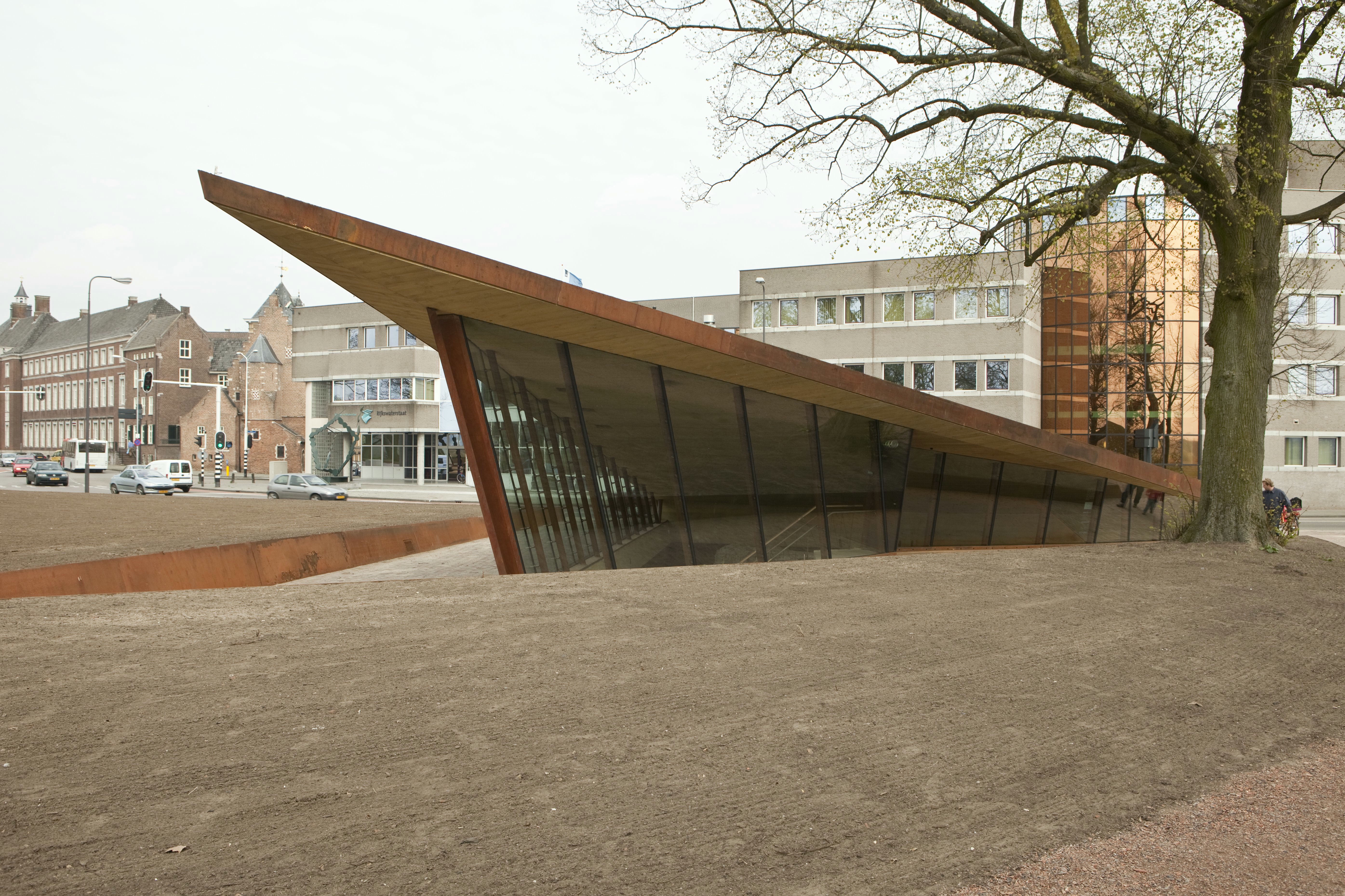 Oude Stadsmuur: Overzicht van het bastion